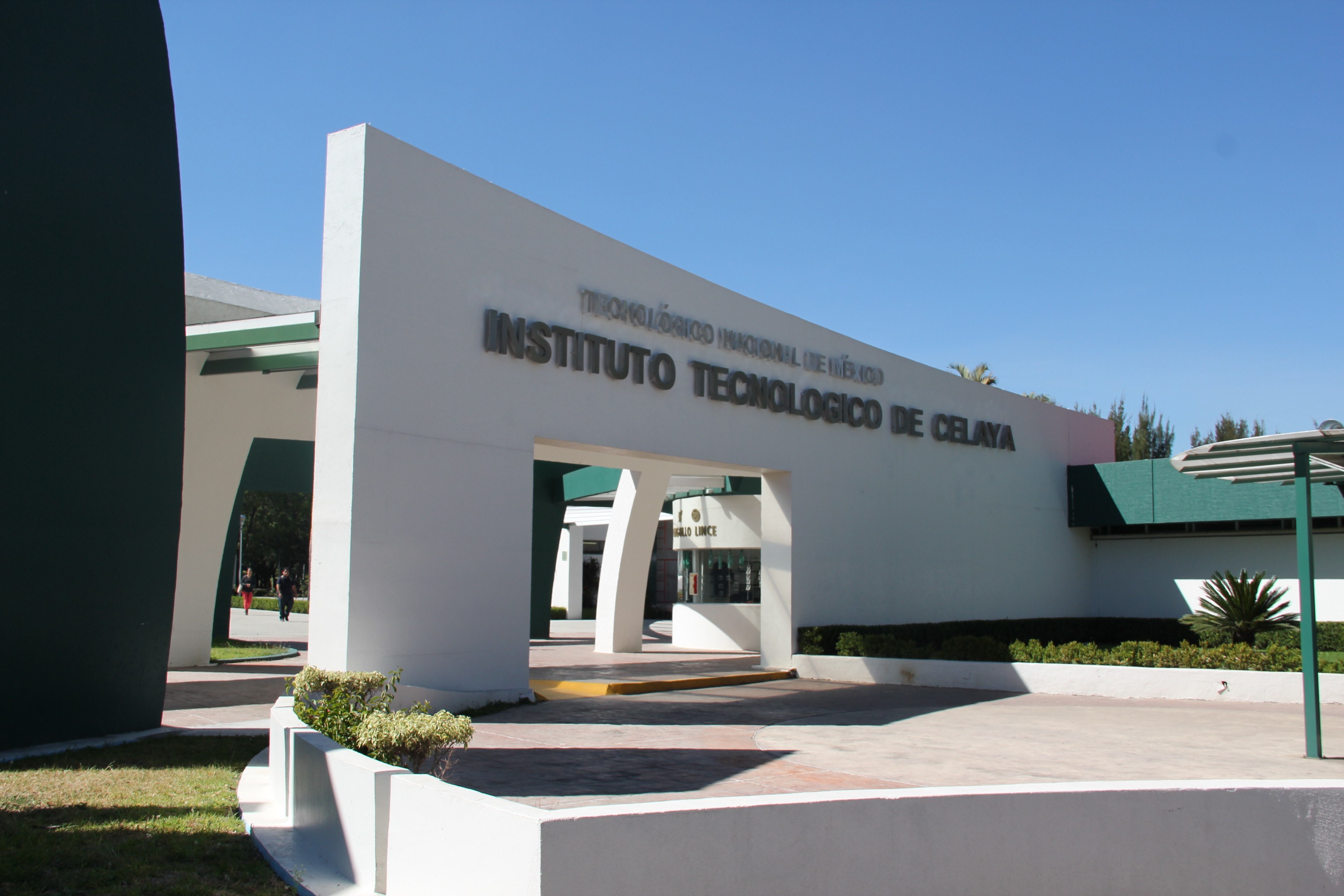 La maestría en ciencias de ingeniería química del Tecnológico Nacional de México (Tecnm) en Celaya, obtuvo la categoría de posgrado de competencia internacional en el Programa Nacional de Posgrados de Calidad (PNPC) del Consejo Nacional de Ciencia y Tecnología (Conacyt).